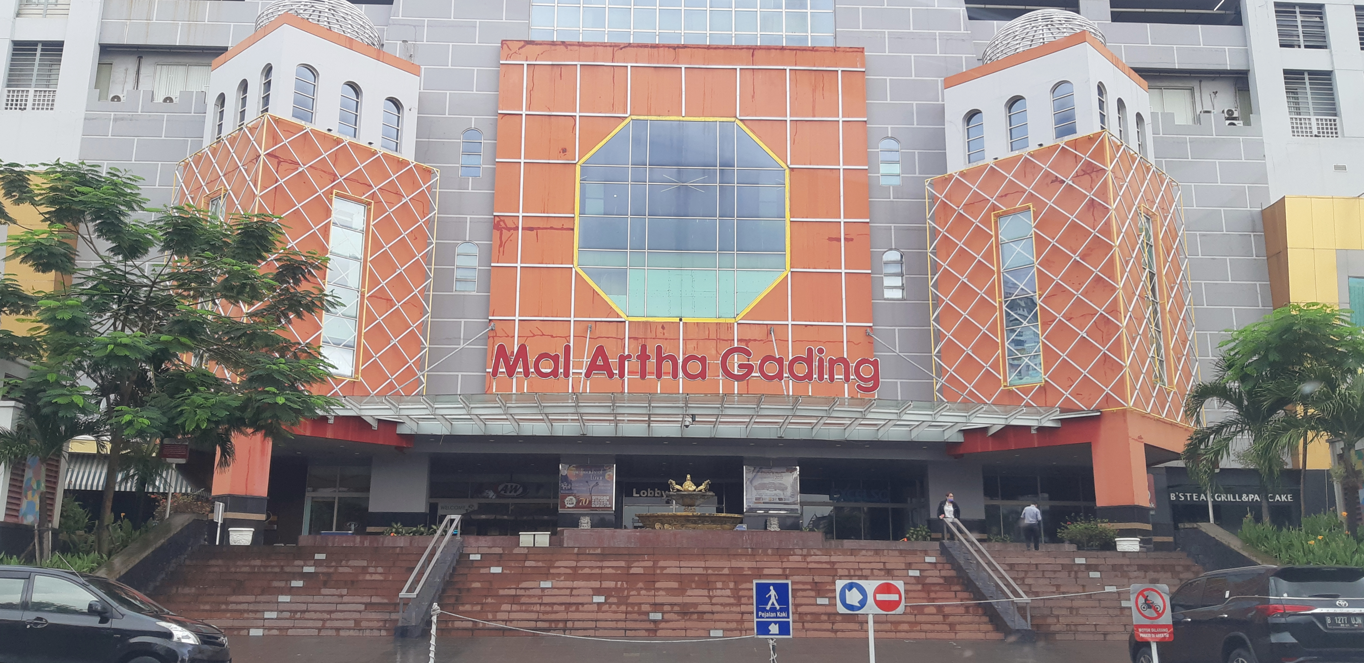 Lobby China Mal Artha Gading